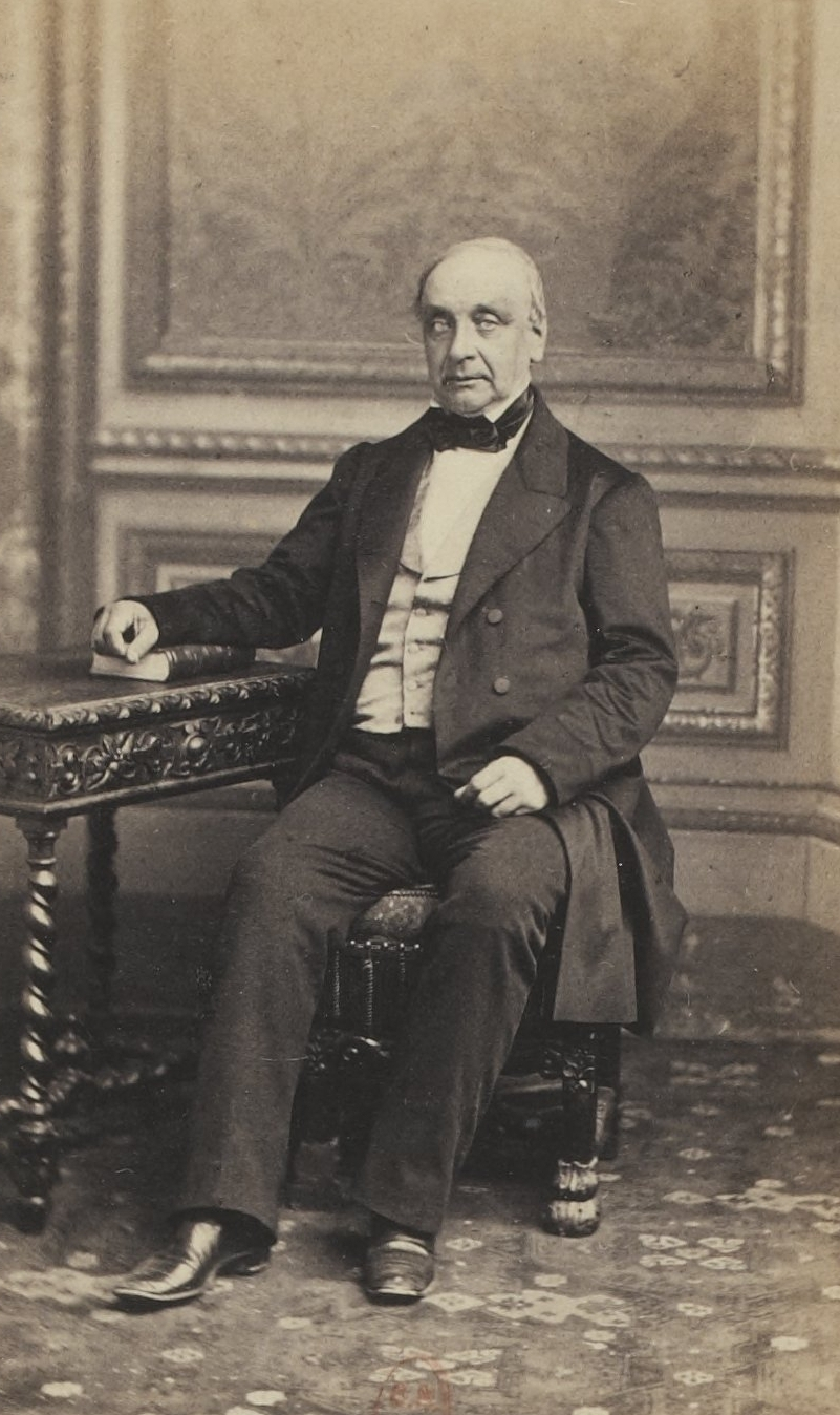 Album des députés au Corps législatif entre 1852-1857.